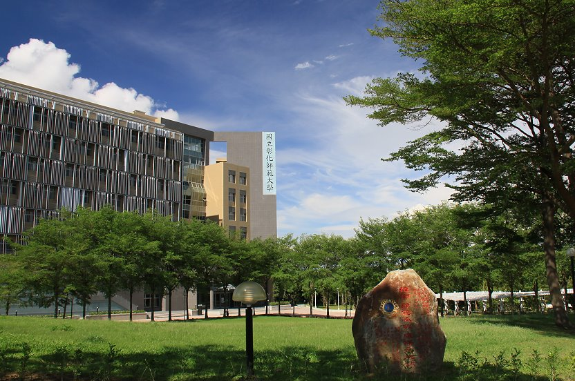 國立彰化師範大學寶山校區工學院大樓